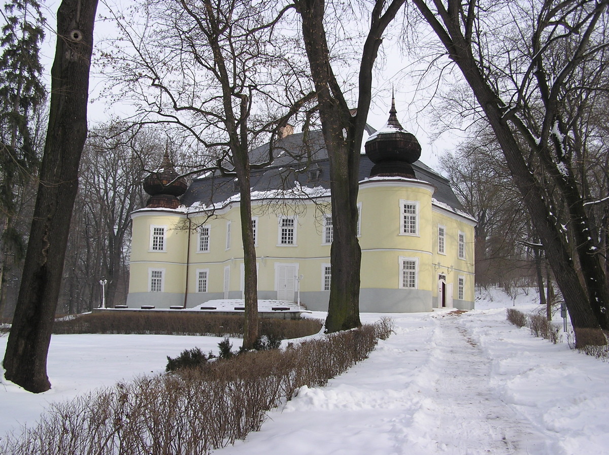 Gyürky-Solymossy kastély 2005. telén